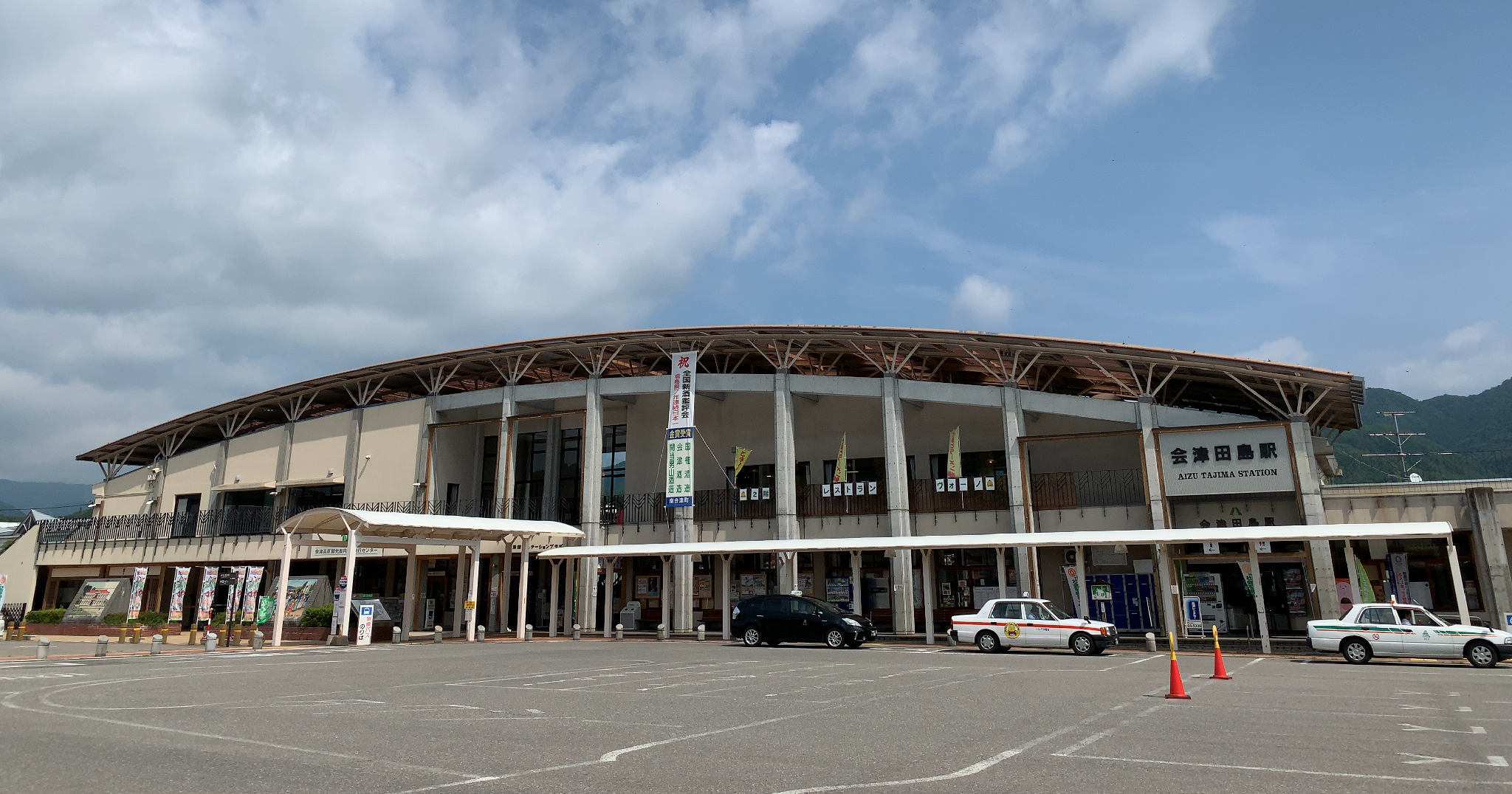 会津鉄道 会津田島駅 駅舎